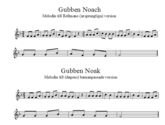 Jämförelse mellan melodierna i Bellmans ursprungliga "Gubben Noach" och dagens barnvisa "Gubben Noak".